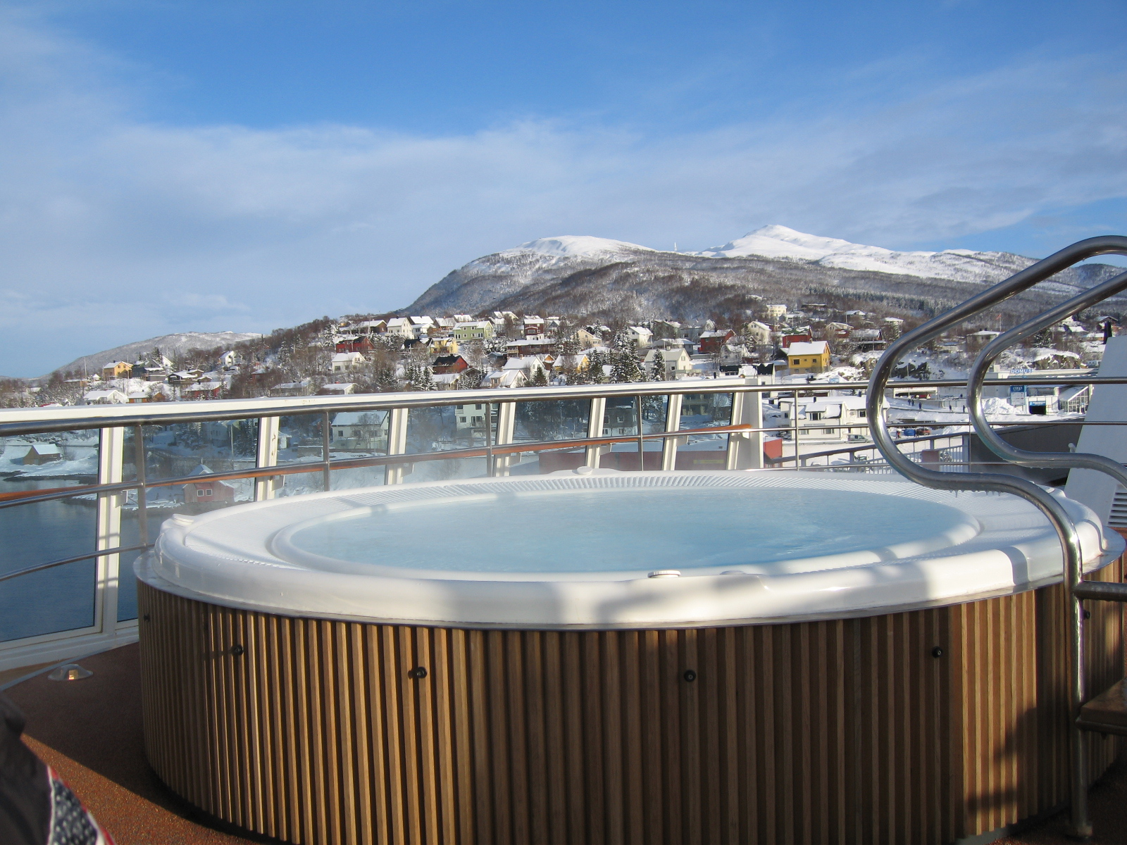 Boblebad om bord på Trollfjord